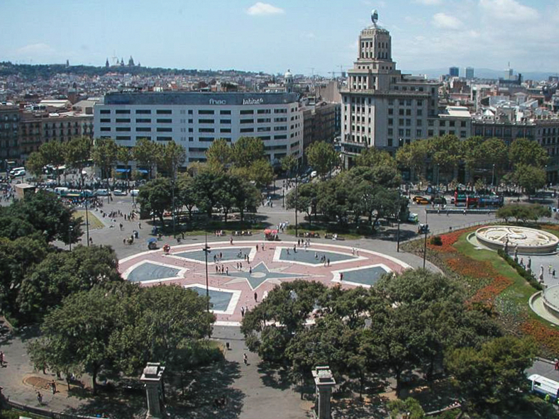 Vista general de la Plaza de Cataluña, Barcelona, España. 2008.